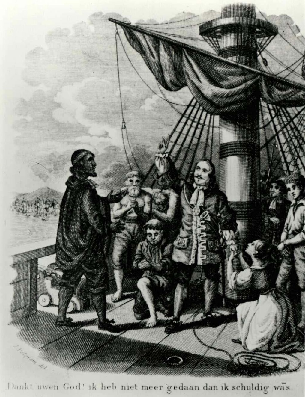 Baai van Napels 1676. Michiel de Ruyter wijst de door hem vrij gekregen Hongaarse predikanten er op dat ze niet hem maar de Heere Heere dankbaar dienen te zijn.